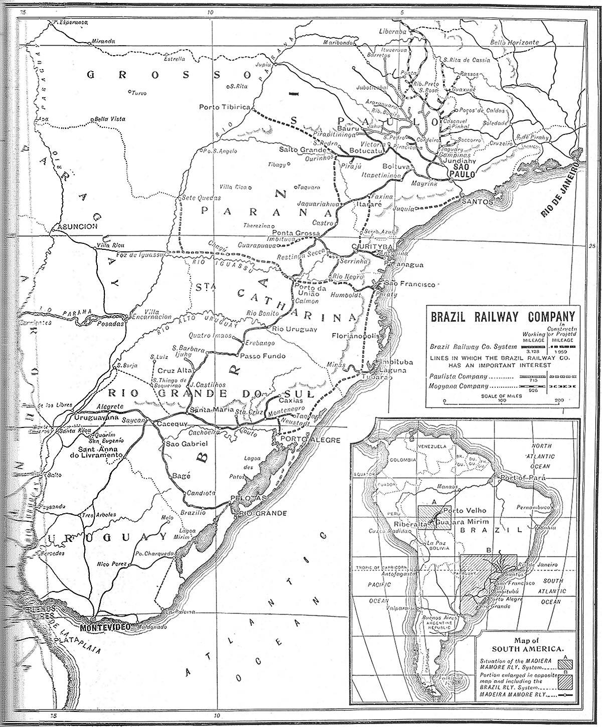 Pag. 228 da Obra: "Impressões do Brazil no Seculo Vinte", editada em 1913 e impressa na Inglaterra por Lloyd's Greater Britain Publishing Company, Ltd., com 1.080 páginas